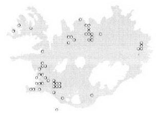 Ареал Salix myrsinifolia в Исландии